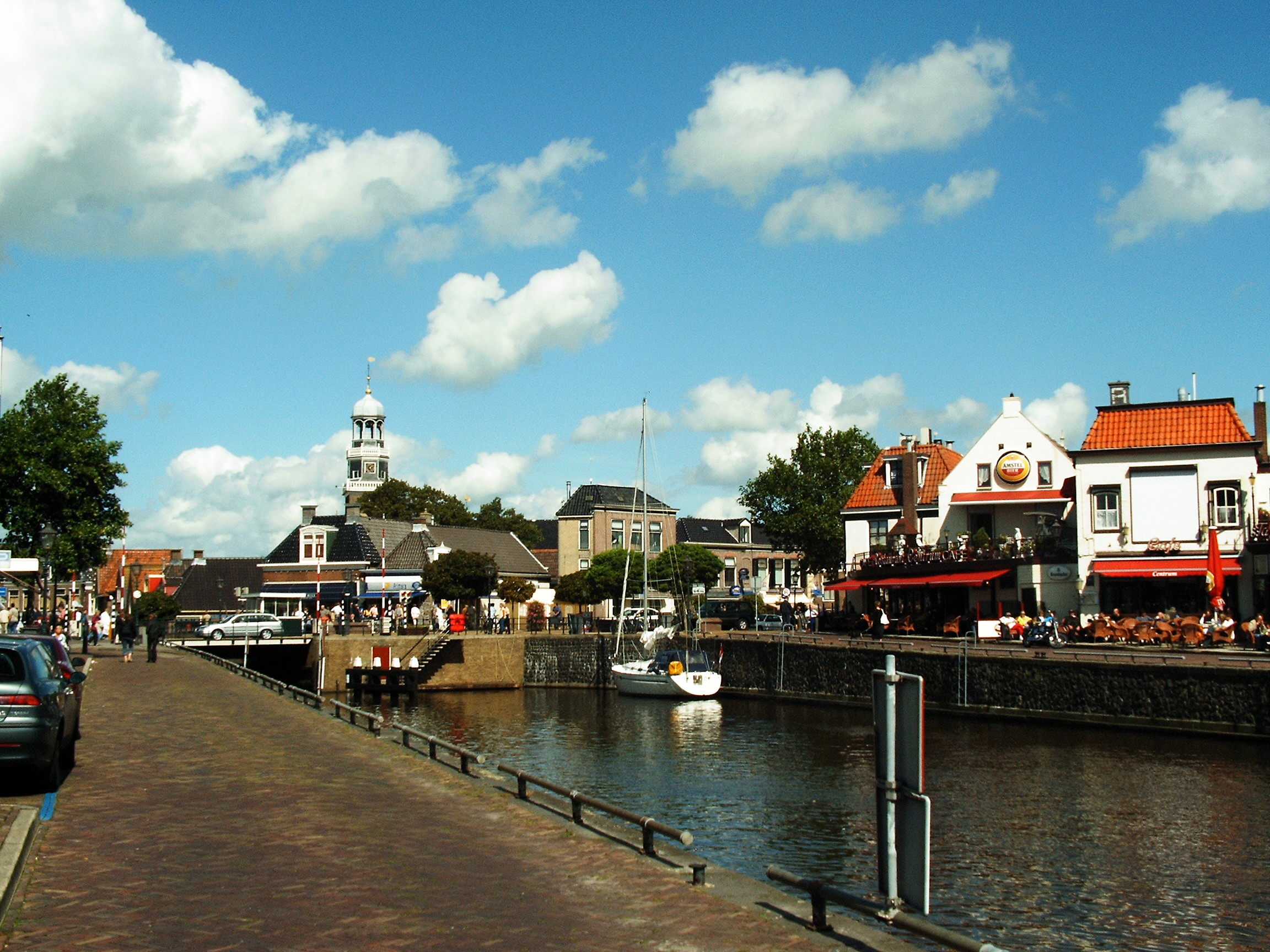 Lemmer - Hafen